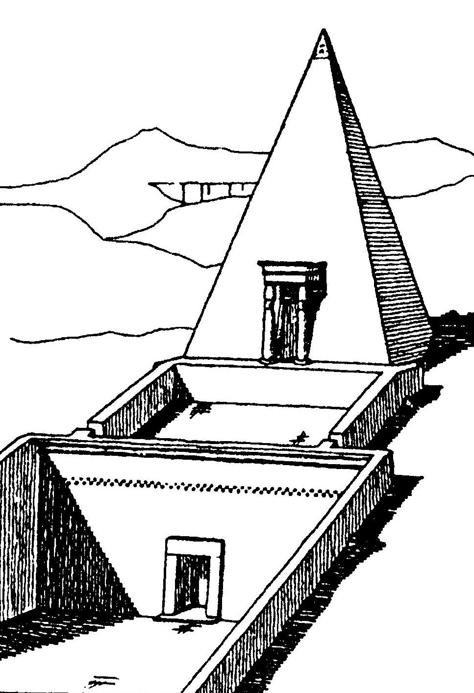 Kaple ve tvaru pyramidy jako součást soukromé hrobky; Dér el Medína